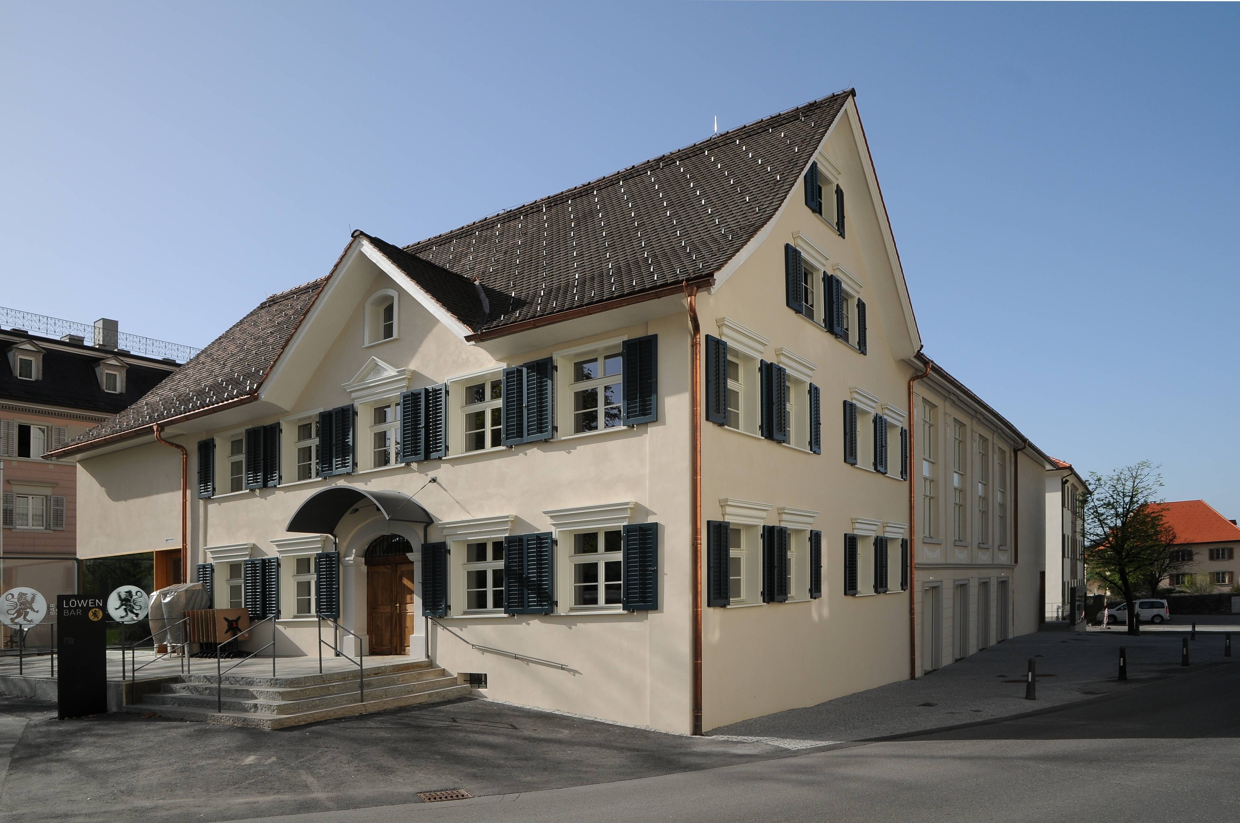 Schloßplatz Nr.:9 in Hohenems; aus dem DEHIO Vorarlberg 1983: Gasthaus, 2geschossig; Zwerchgiebel zum Platz, Rundbogenportal (A.19.Jh?). 3geschossiger Anbau, Pilastergliederung, Festonschmuck mit sezessionistischem Einfluß. 2011 generalsaniert.